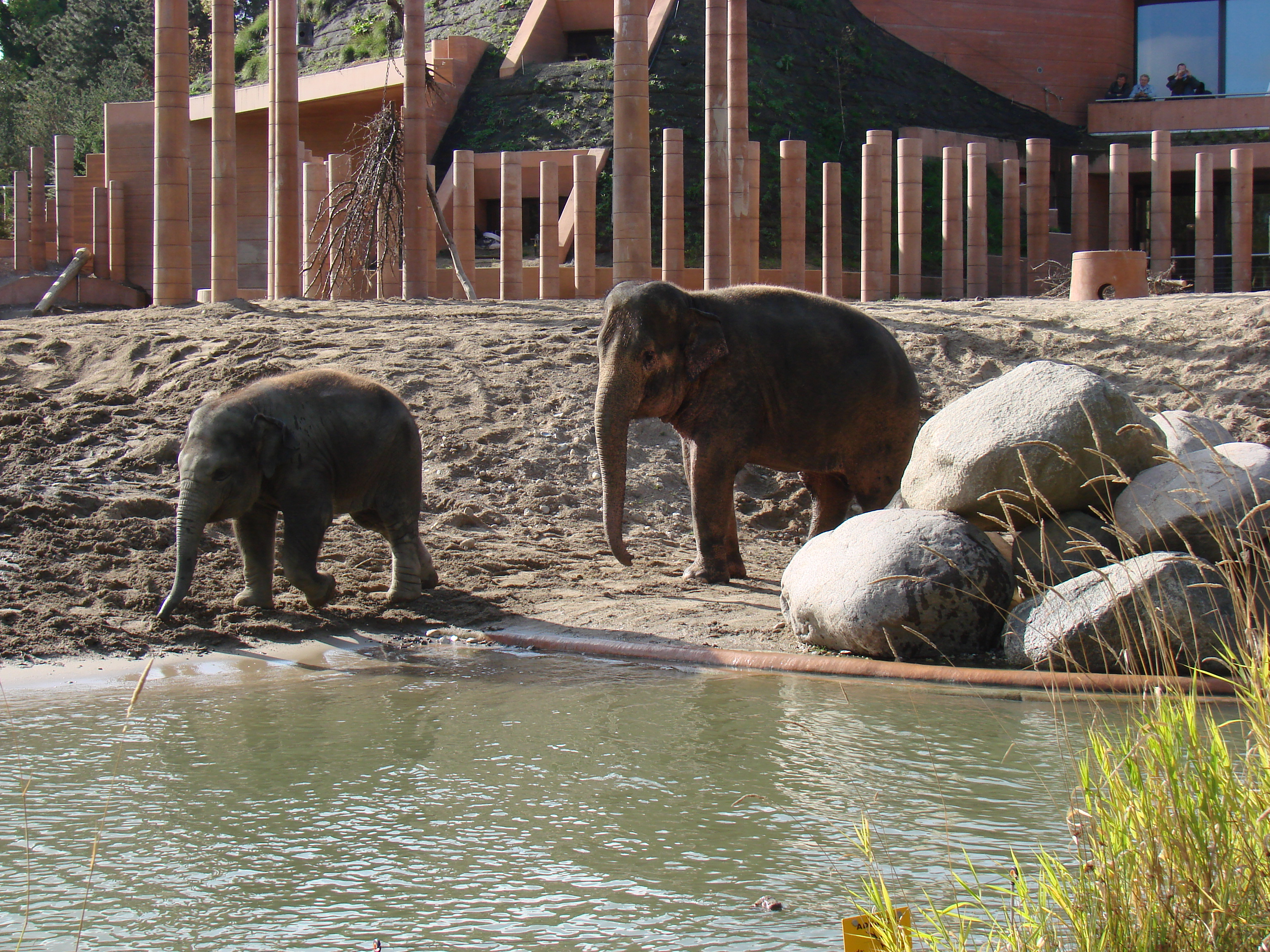 Elefanten vor dem neuen Elefantenhaus des Zoos in Kopenhagen